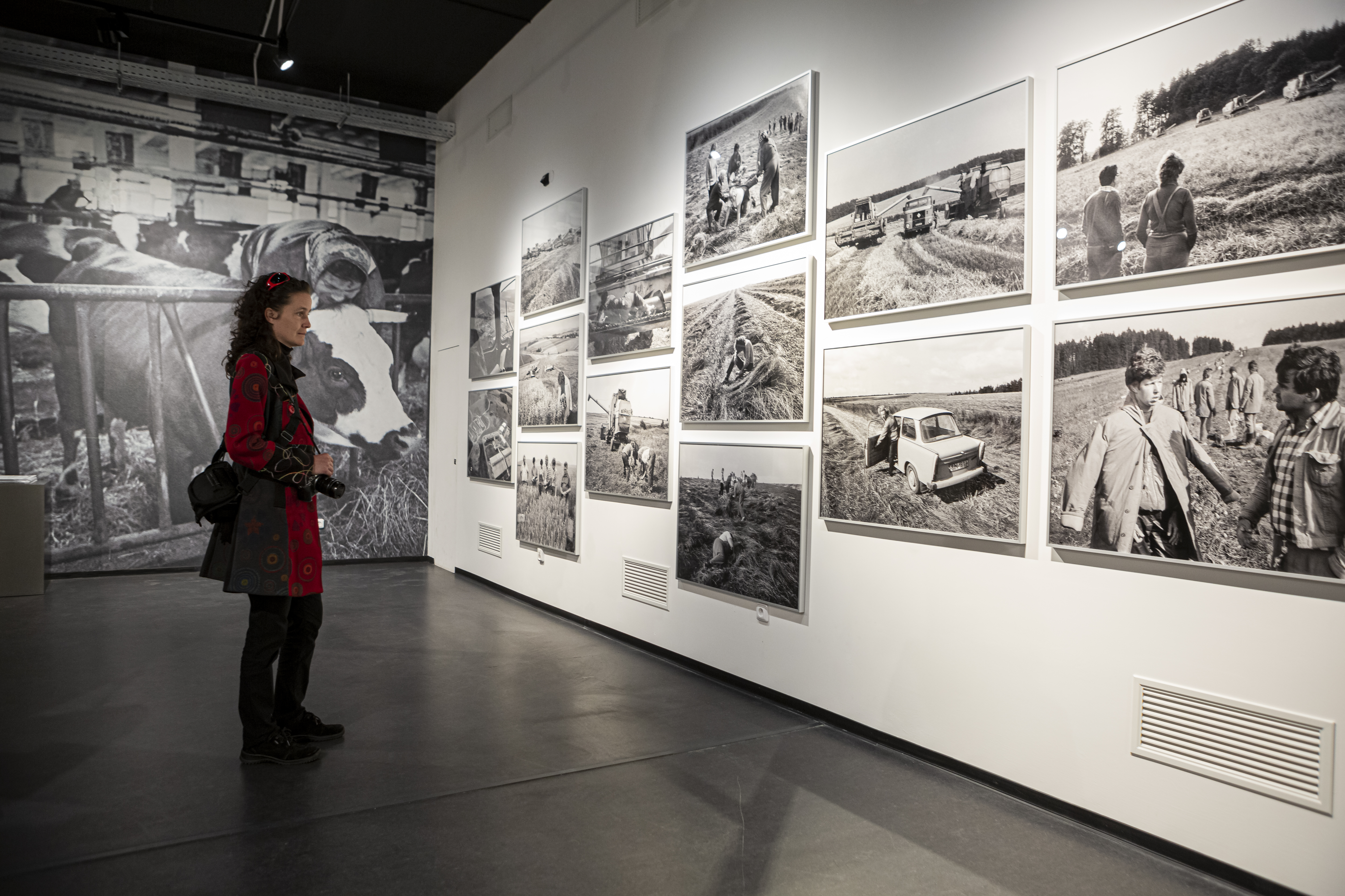 Dva fotografické cykly Jindřicha Štreita zachycující české zemědělství v 80. letech 20. století a v roce 2018, doplněné o exponáty věnované cyklům lidského života, základní cykly energie, hmoty a života. Národní zemědělské muzeum Praha. Termín konání: 20. 9. 2019 – 31. 7. 2020